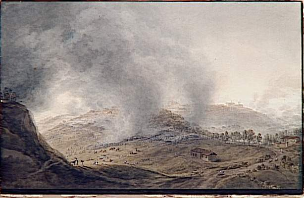 Première vue de la bataille de Mondovi et de la position de Brichetto - le 21 avril 1796. Versailles, châteaux de Versailles et de Trianon.